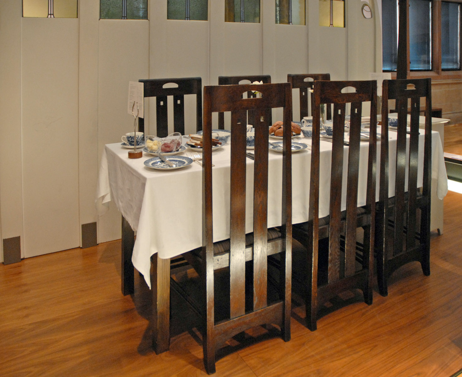 Dans le Kelvingrove Museum, l'exposition "Mackintosh and the Glasgow Style" présente l'origine du style de Glasgow, Il commente les oeuvres et la vie de l'architecte, peintre et designer Charles Rennie Mackintosh, de son épouse Margaret Macdonald et de sa soeur Frances Macdonald, en particulier leur exposition commune à la Sécession de Vienne en 1900, puis la conception des intérieurs des salons de thé de Mme Cranston. L'exposition aborde l'impact sur la décoration intérieure des relations qu'ont entretenues les artistes de l'Ecole de Glasgow avec les industriels de l'époque. Le travail des métaux, de l'émail et du verre entre 1880 et 1920 est illustré.